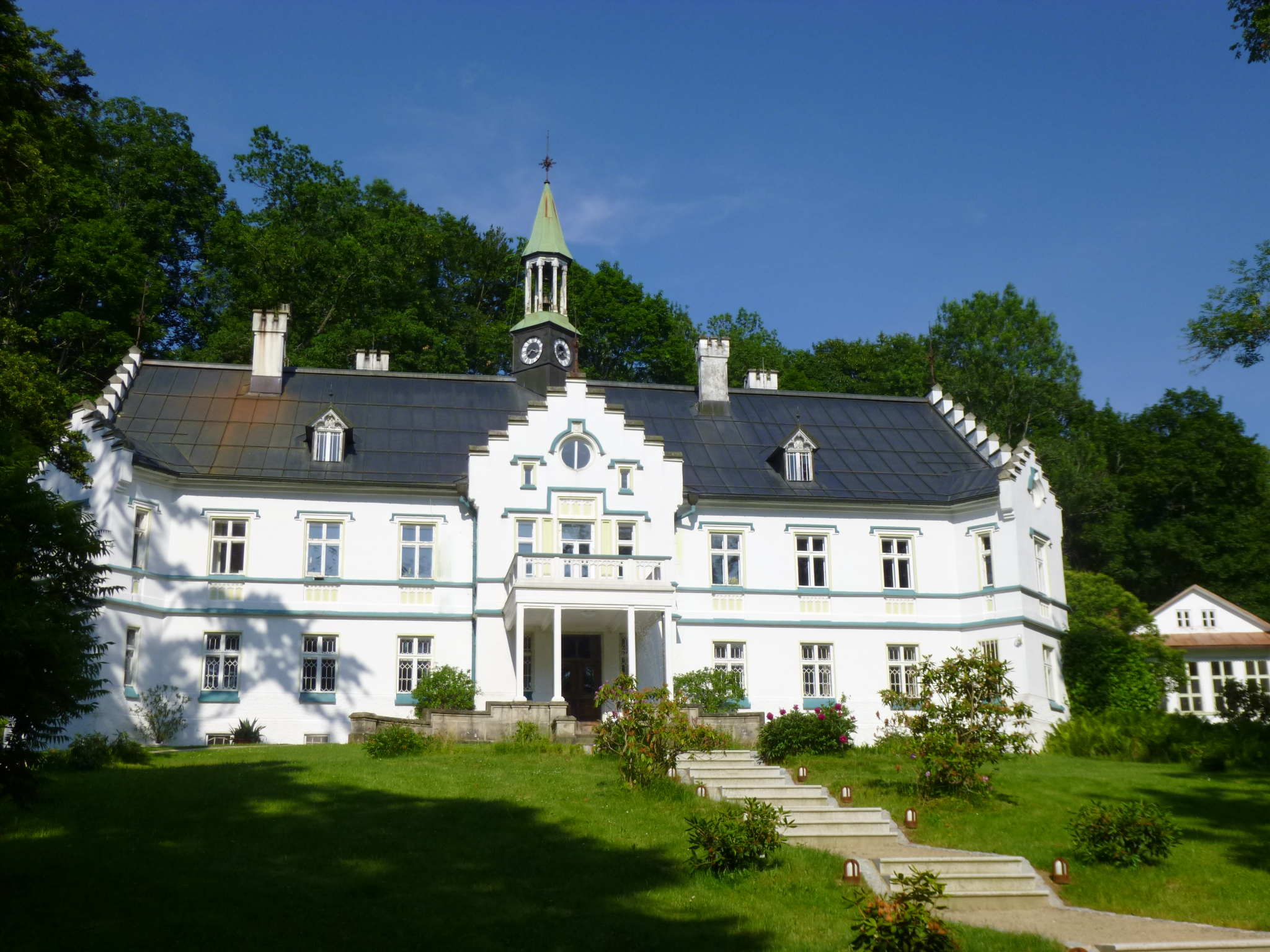 Ehemaliger Gutsherrensitz, zweigeschossigiger Satteldachbau mit Treppengiebeln, Erckerkern und Dachreiter, historisierend, 1840 für den Glasfabrikanten Ferdinand Poschinger errichtet. Heute in Besitz es Fördervereins. Es finden kulturelle Veranstaltungen statt. Liste der Baudenkmäler in Lindberg.